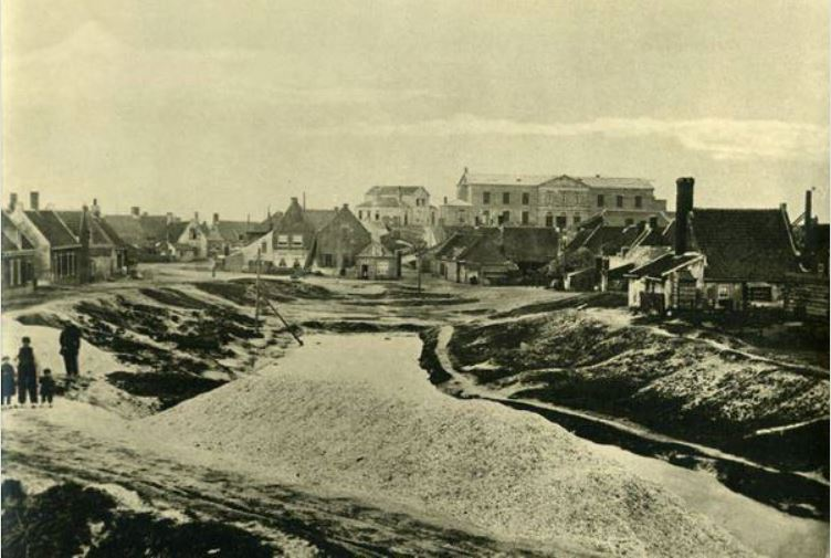 Le quartier de Rooie Buurt et du canal Het Mallegat, fin du XIXe, début du XXe siècle.